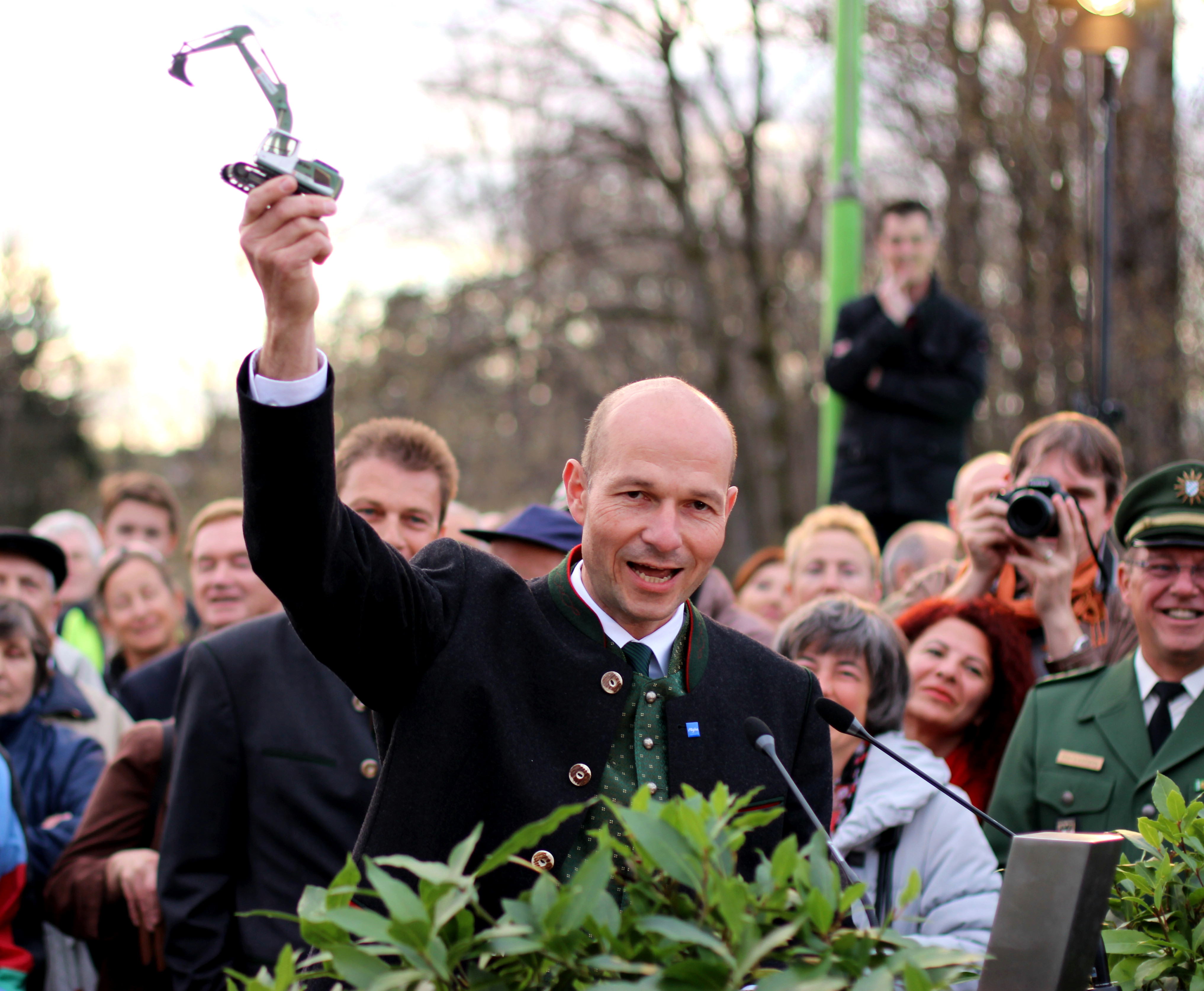 Thomas Kiechle (CSU) bei der Eröffnung der Nordspange in Kempten: In der Hand hält er einen Miniaturbagger, den er später dem Bayerischen Innenminister Joachim Herrmann (CSU) übergab. Es ist eine bildhafte Erinnerung an den Baggerunfall beim Spatenstich für das Bauvorhaben in Kempten, bei dem der Minister einen Bagger bediente und mitsamt umkippte